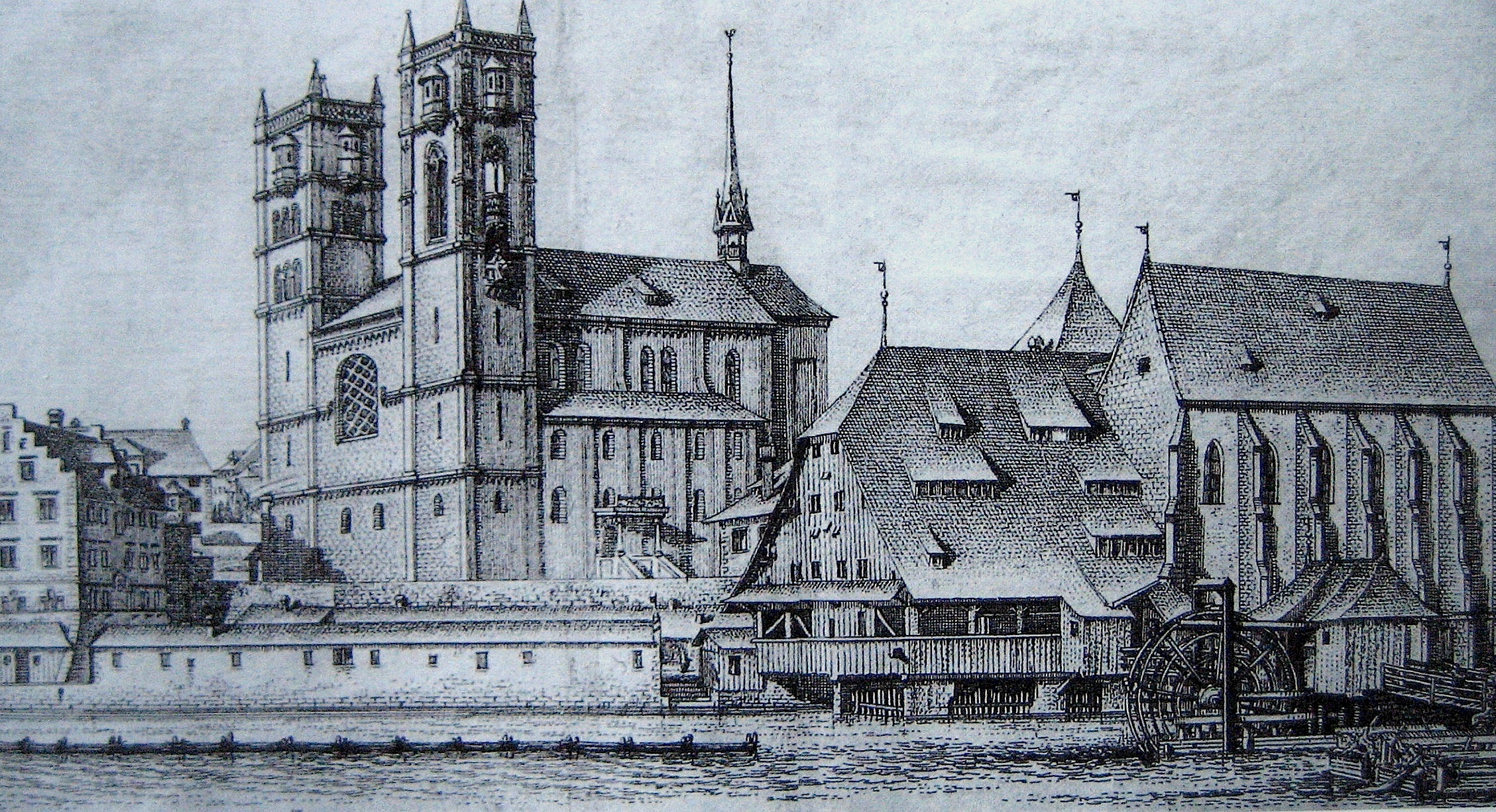 Grossmünster, Helmhaus und Wasserkirche in Zürich 1770. Radierung von Johann Balthasar Bullinger.